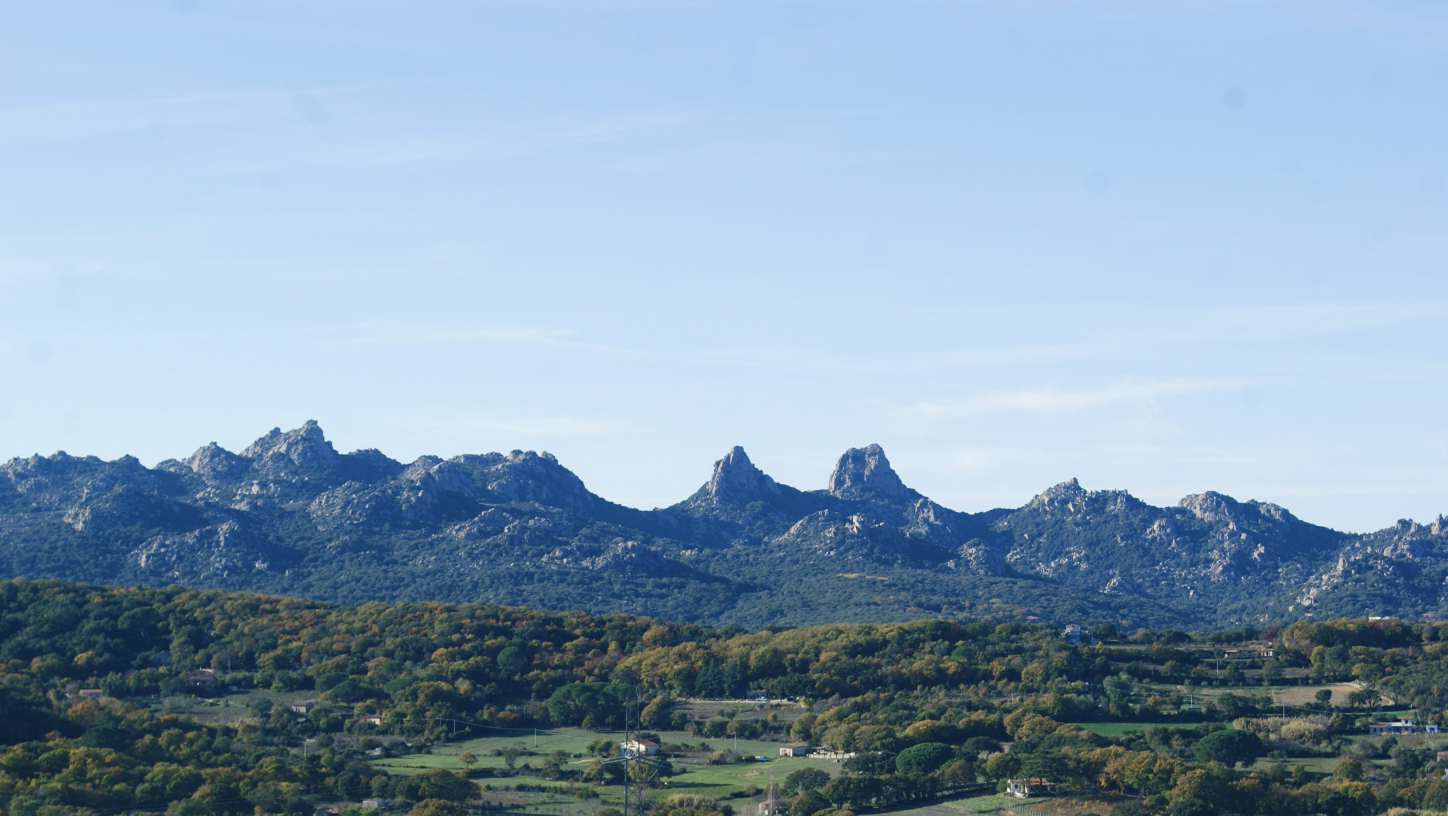 Monti di Aggius